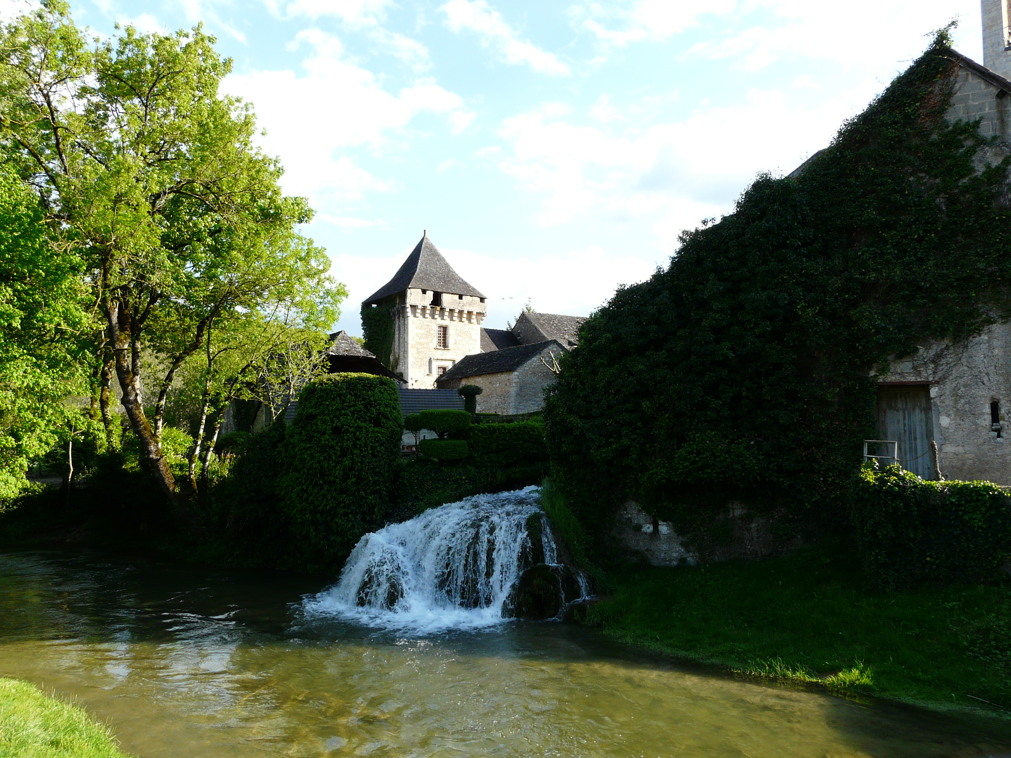 La cascade de la branche supérieure du Coly rejoignant le cours principal du Coly, 30 mètres avant sa confluence avec la Vézère, Condat-sur-Vézère, Dordogne, France. Au fond, le donjon du château de Condat